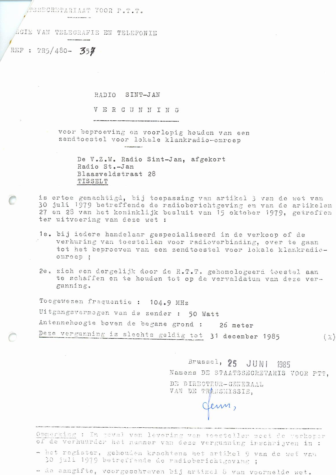 Een (oud) voorbeeld van een vergunnning